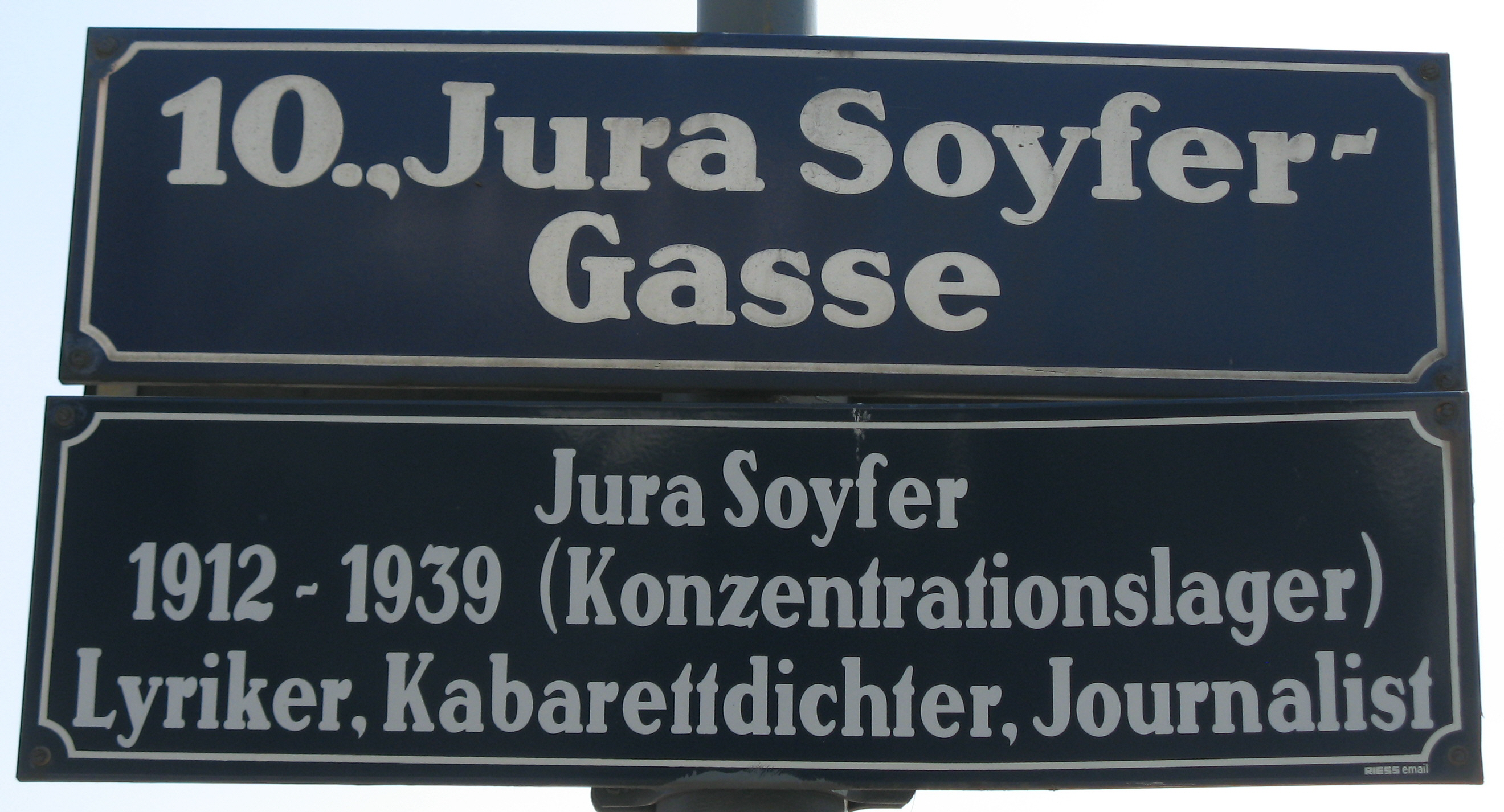 Straßentafel mit Zusatzschild, Jura-Soyfer-Gasse, Per-Albin-Hansson-Siedlung Ost, Wien-Favoriten